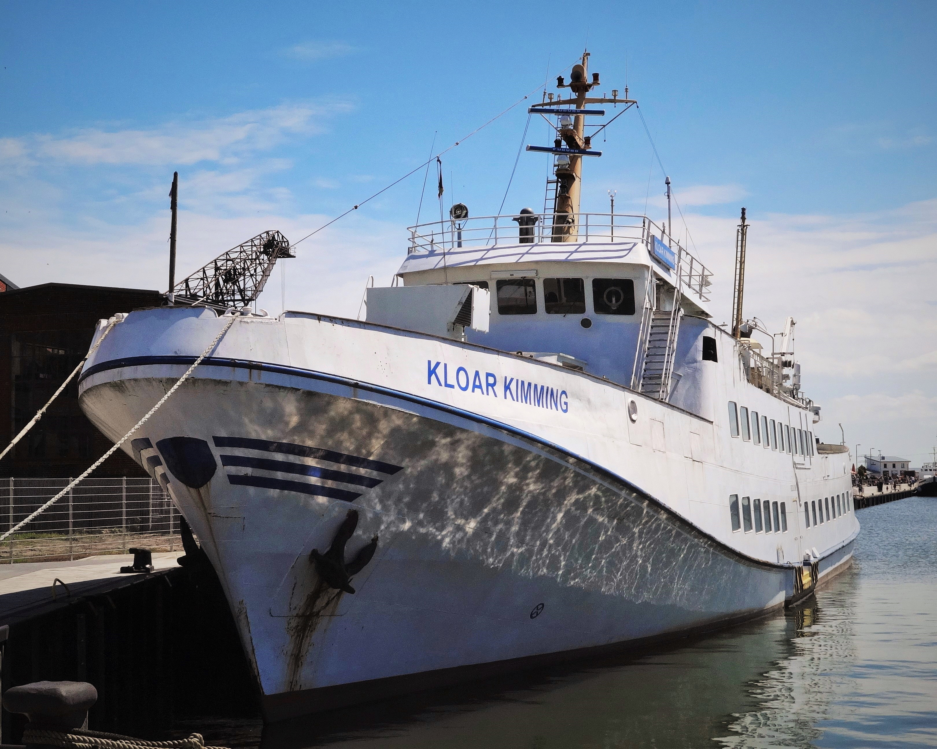 Das Seebäderschiff Kloar Kimming am 09.07.2017 in Peenemünde.